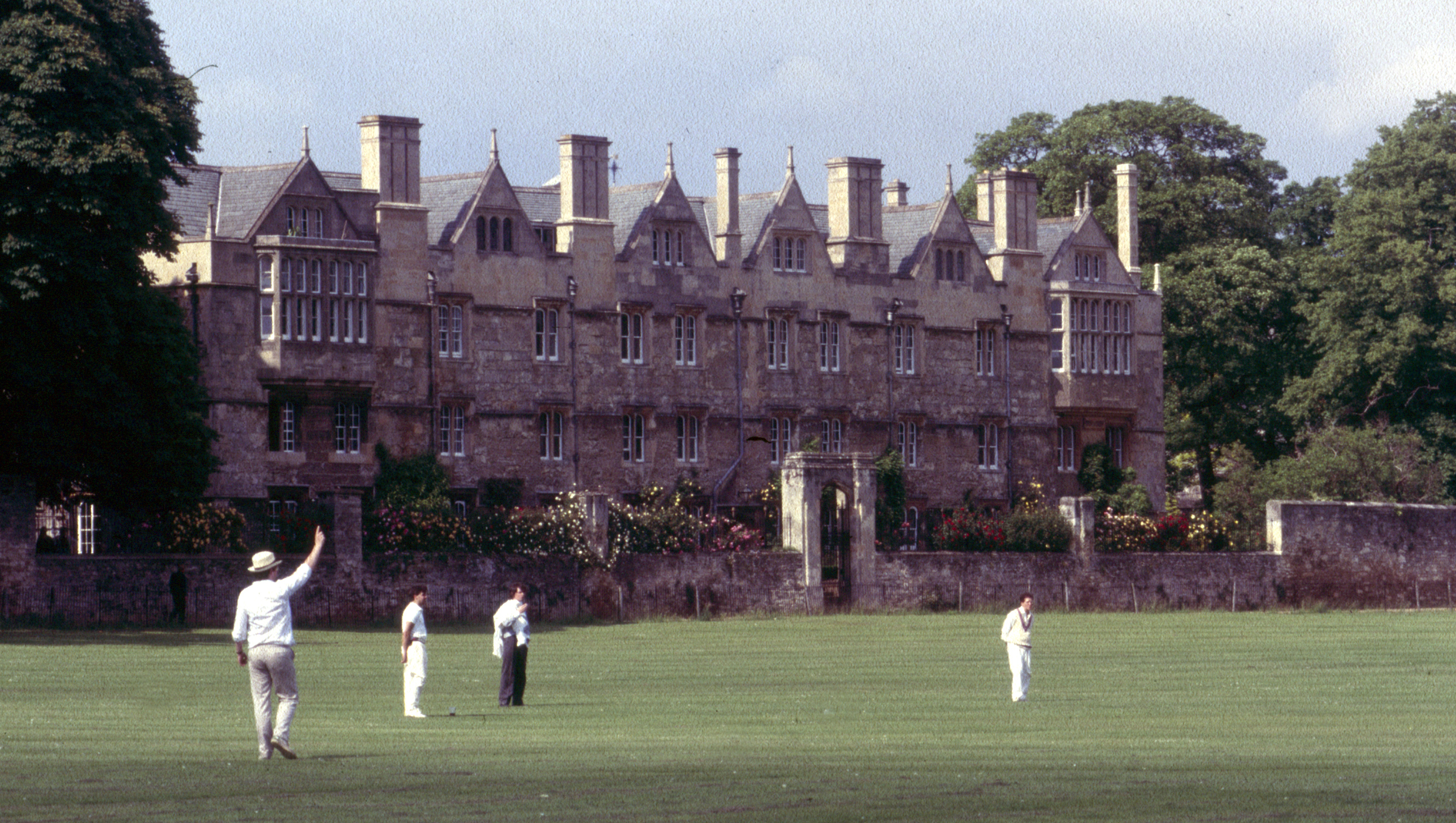 1985 in Oxford